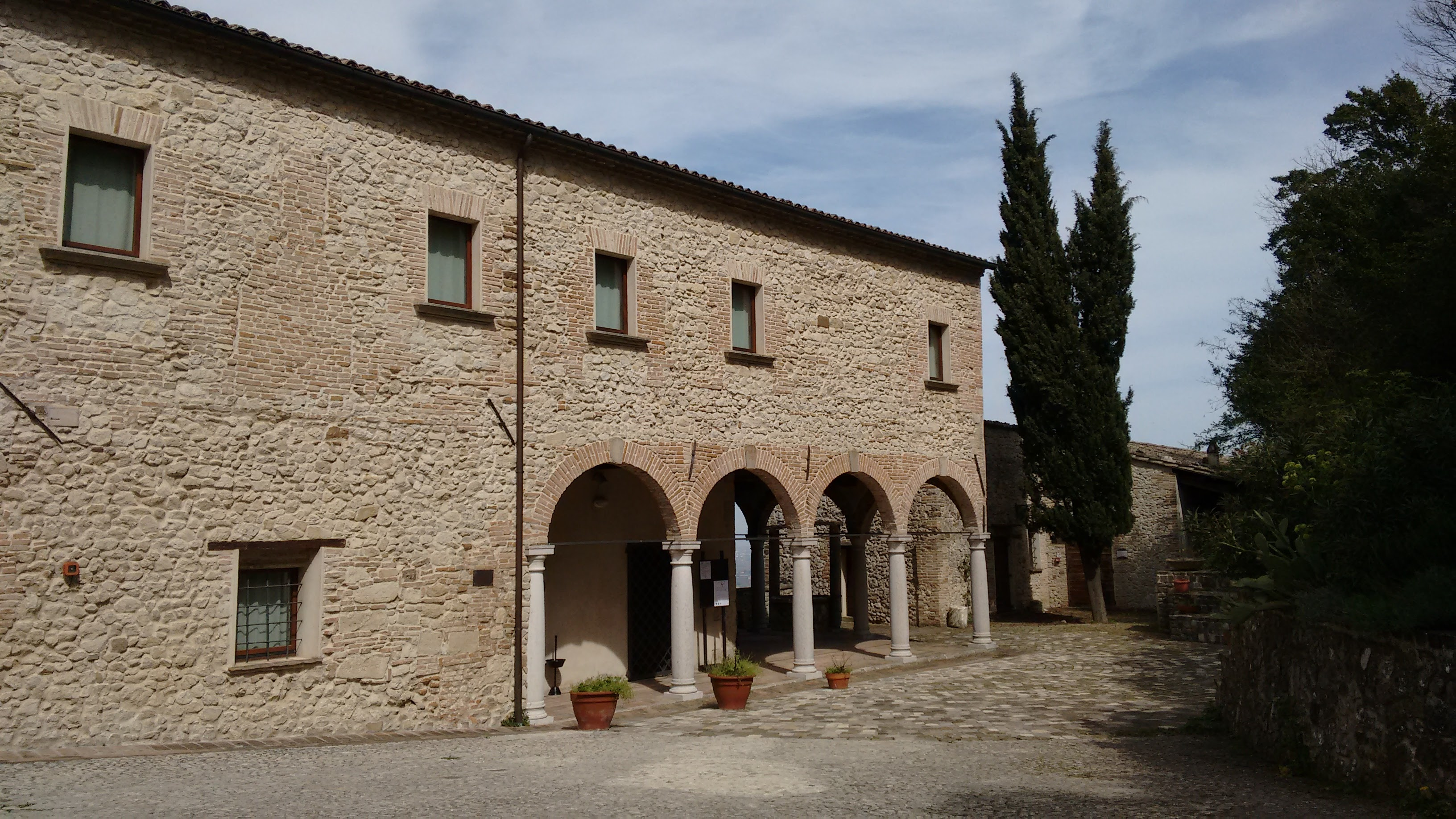 L'ingresso al Museo nell'ex Monastero di Sant'Agostino